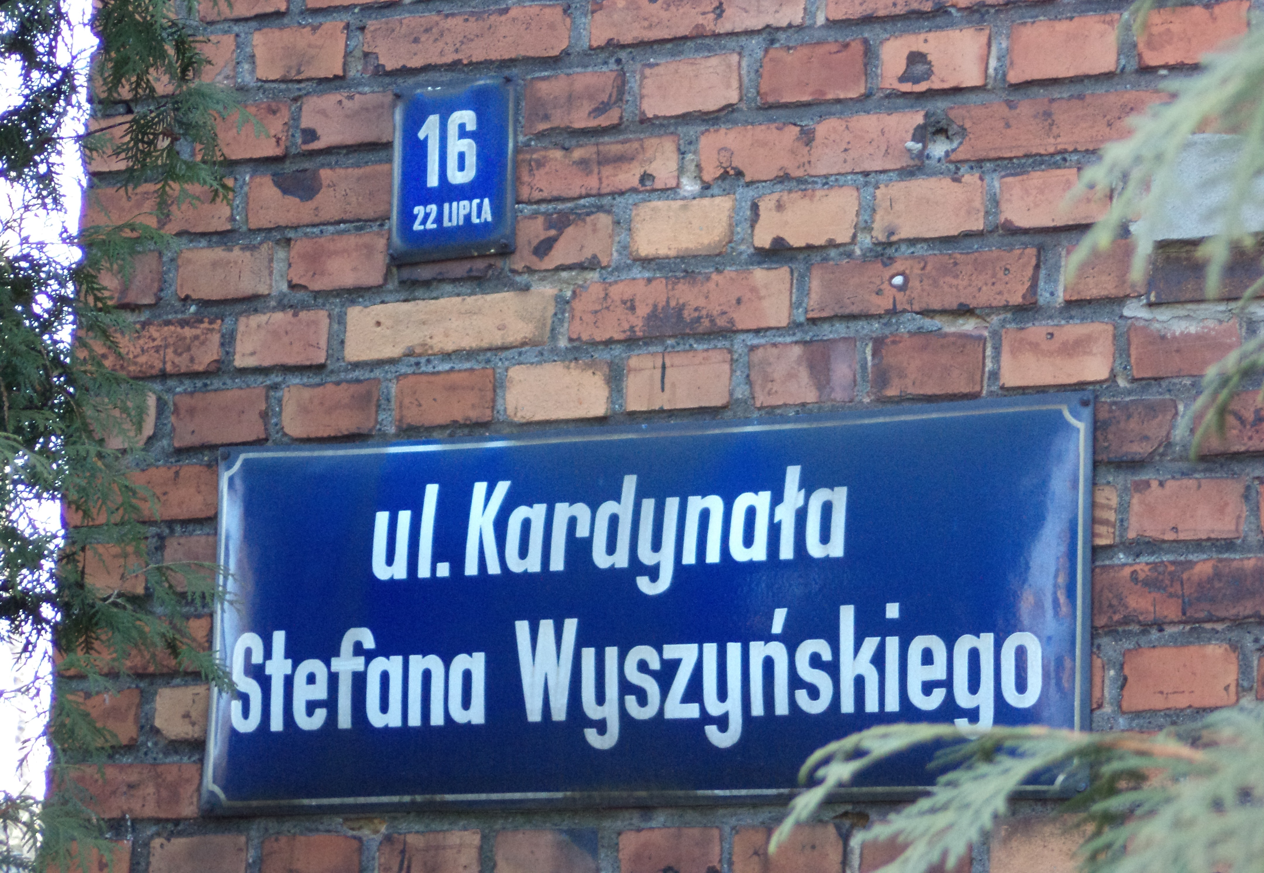 Tablice z nazwami ulicy Kardynała Stefana Wyszyńskiego w Tarnowskich Górach - obecną i z okresu tzw. Polski Ludowej